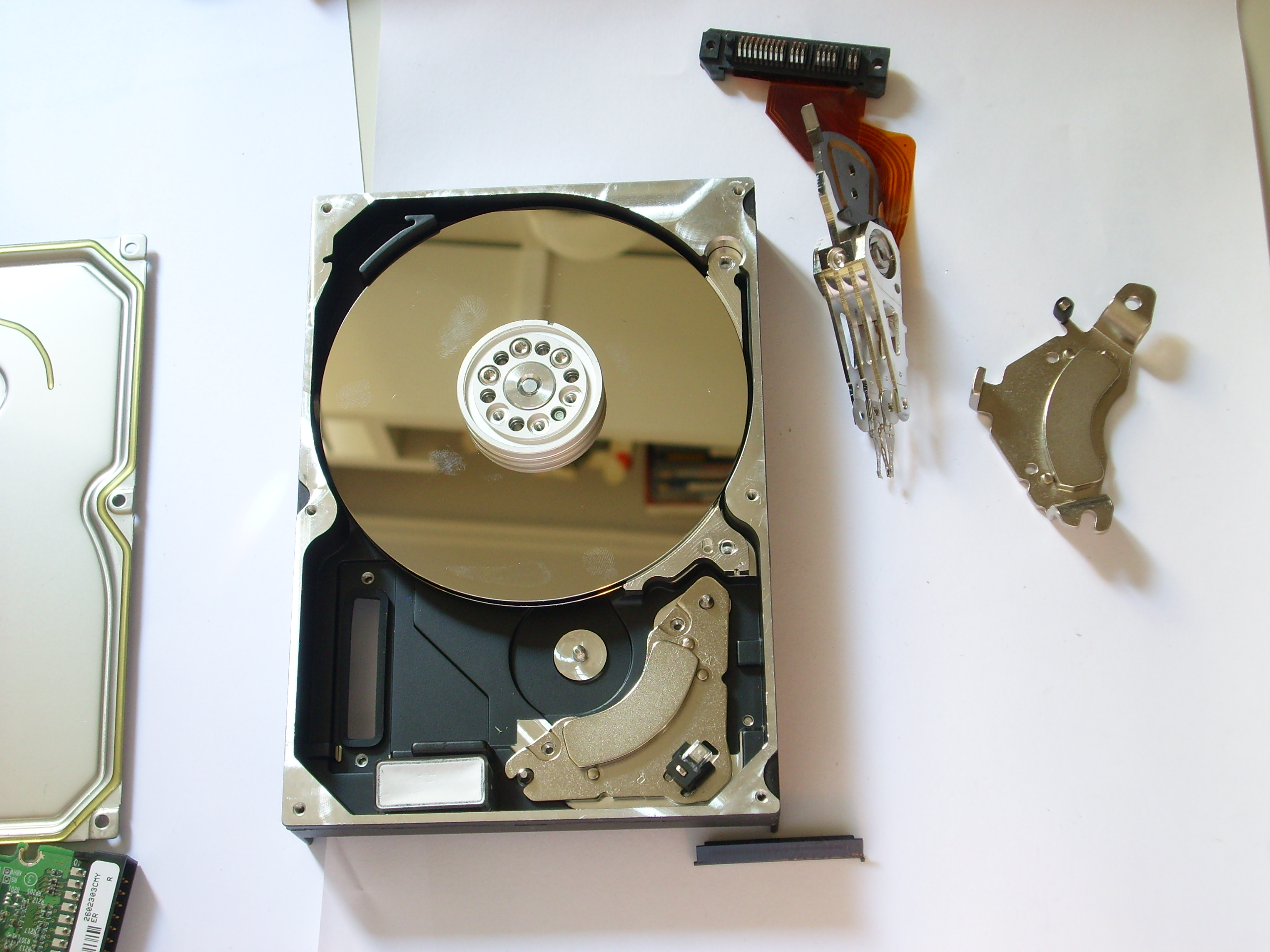 Apertura di un hard disk. Il disco aperto con le testine e la prima calamita del sistema di controllo delle testine rimosse.